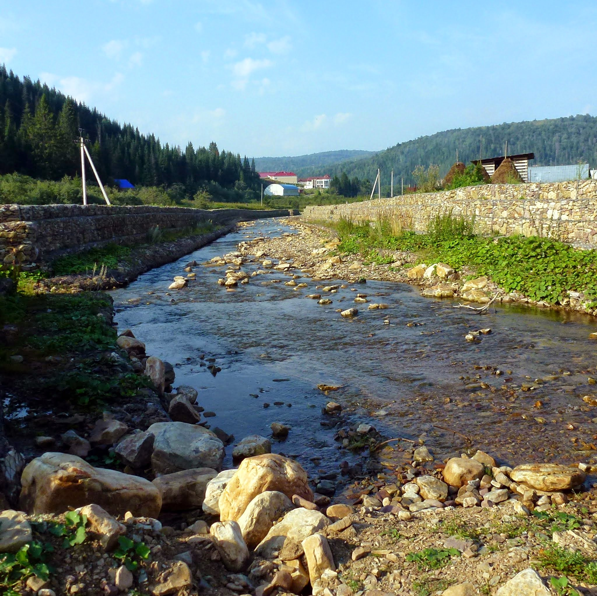 Река Туз, Ассы, Башкортостан